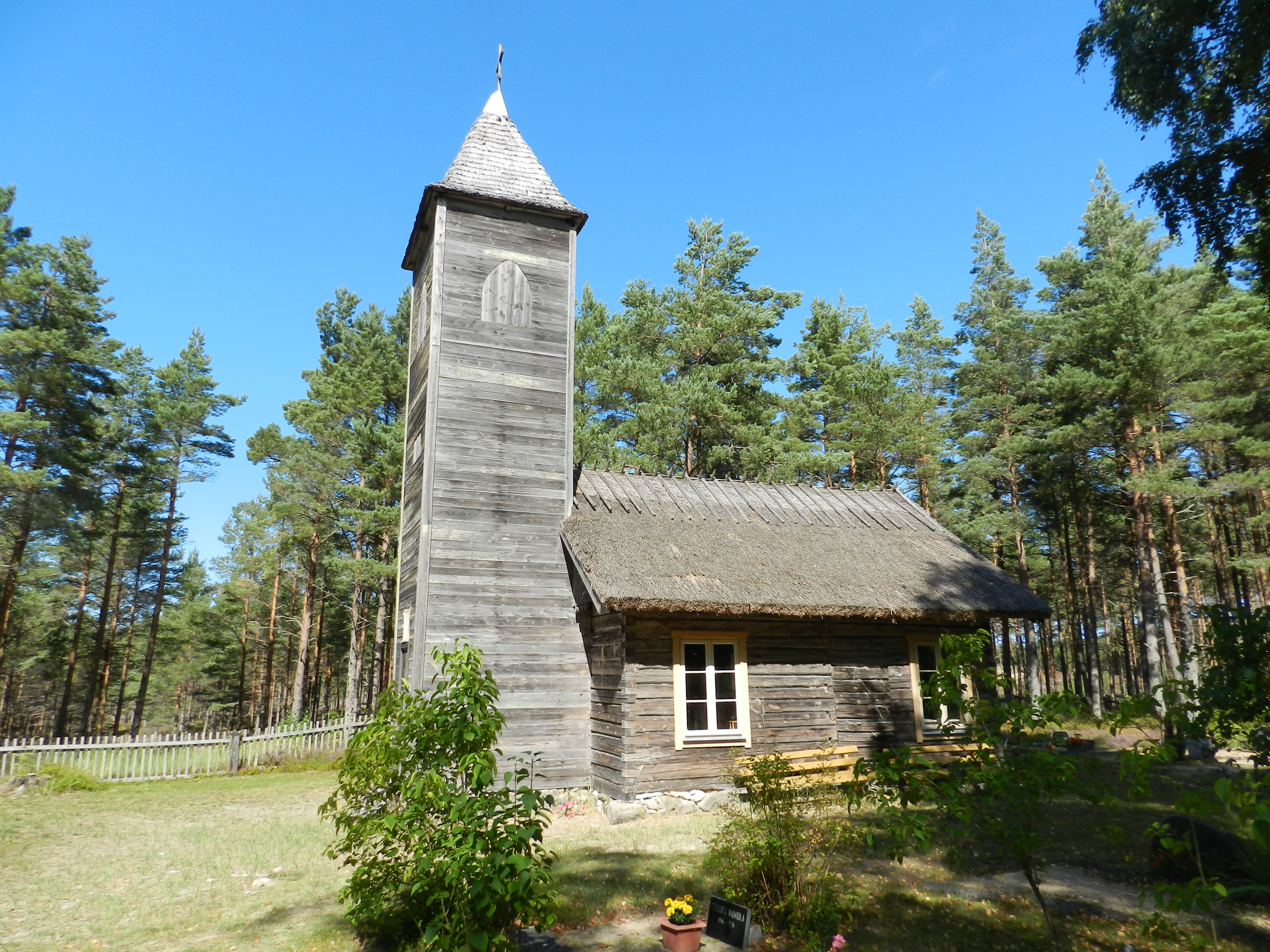 Õigeusukabel Malvastes, Hiiumaa